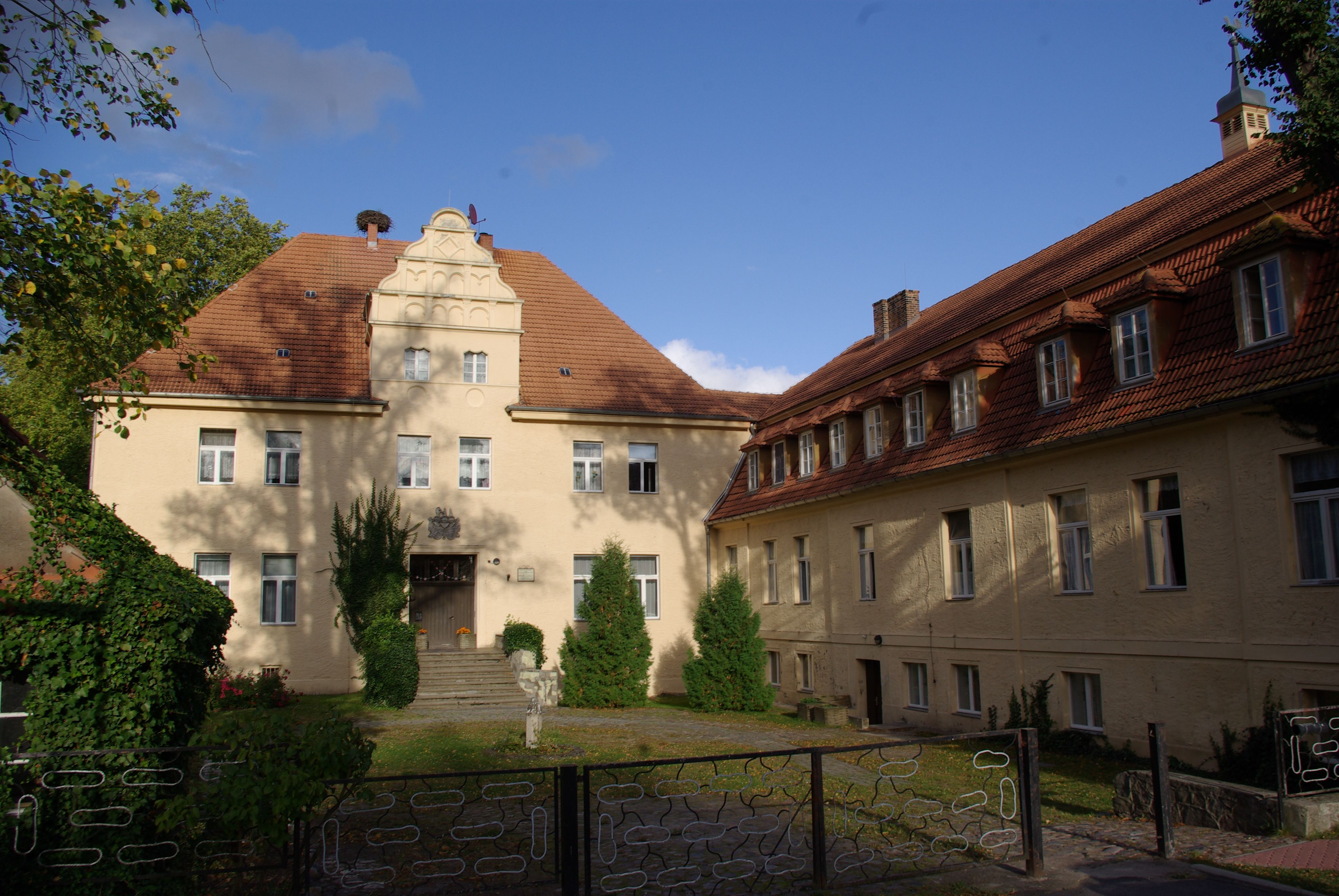 Angermünde Ortsteil Stolpe in Brandenburg. Das Herrenhaus in Stolpe steht unter Denkmalschutz. Das Haus wurde von Leopold von Buch errichtet.